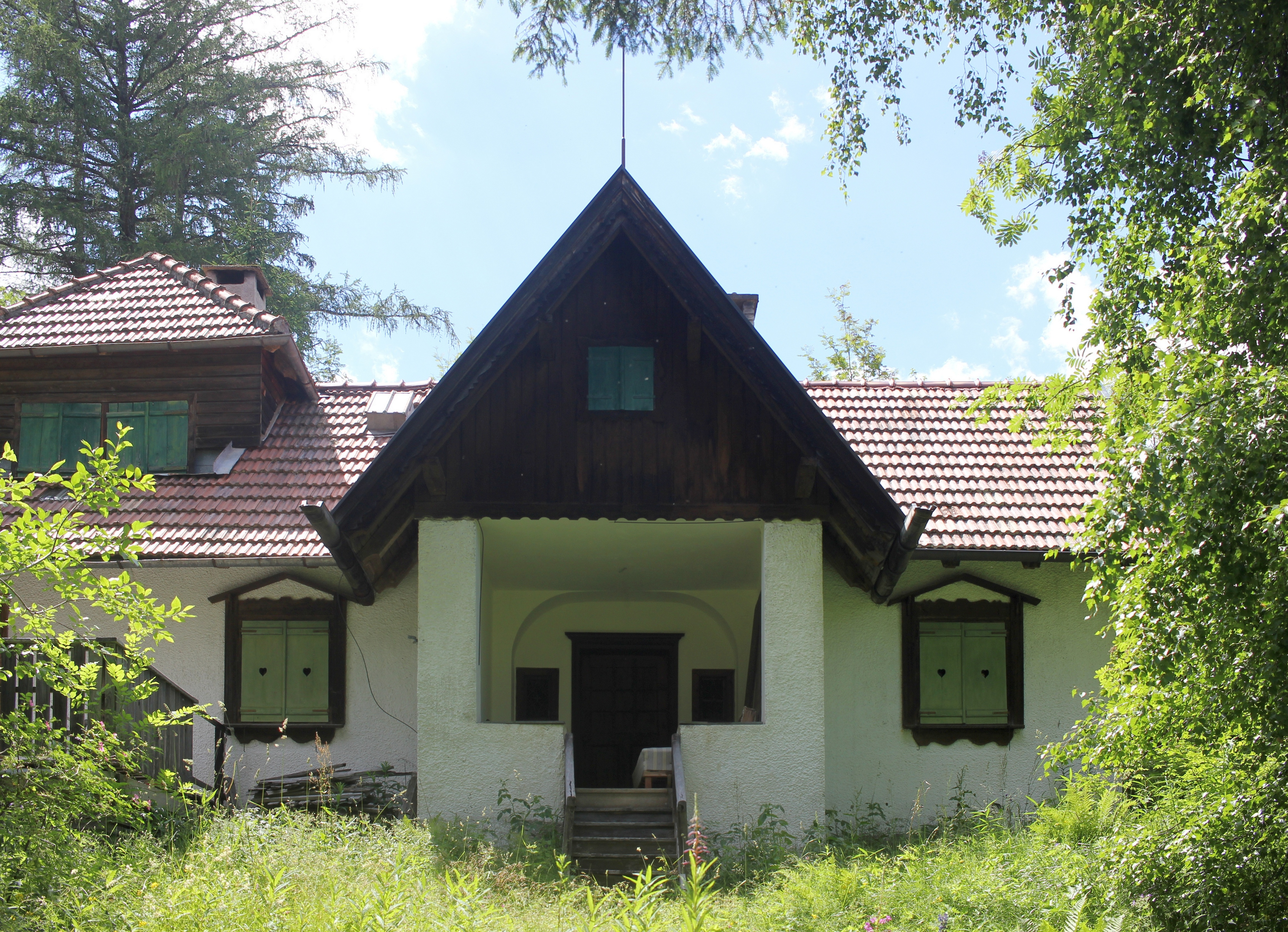 Villa Flora Singer am Vigiljoch